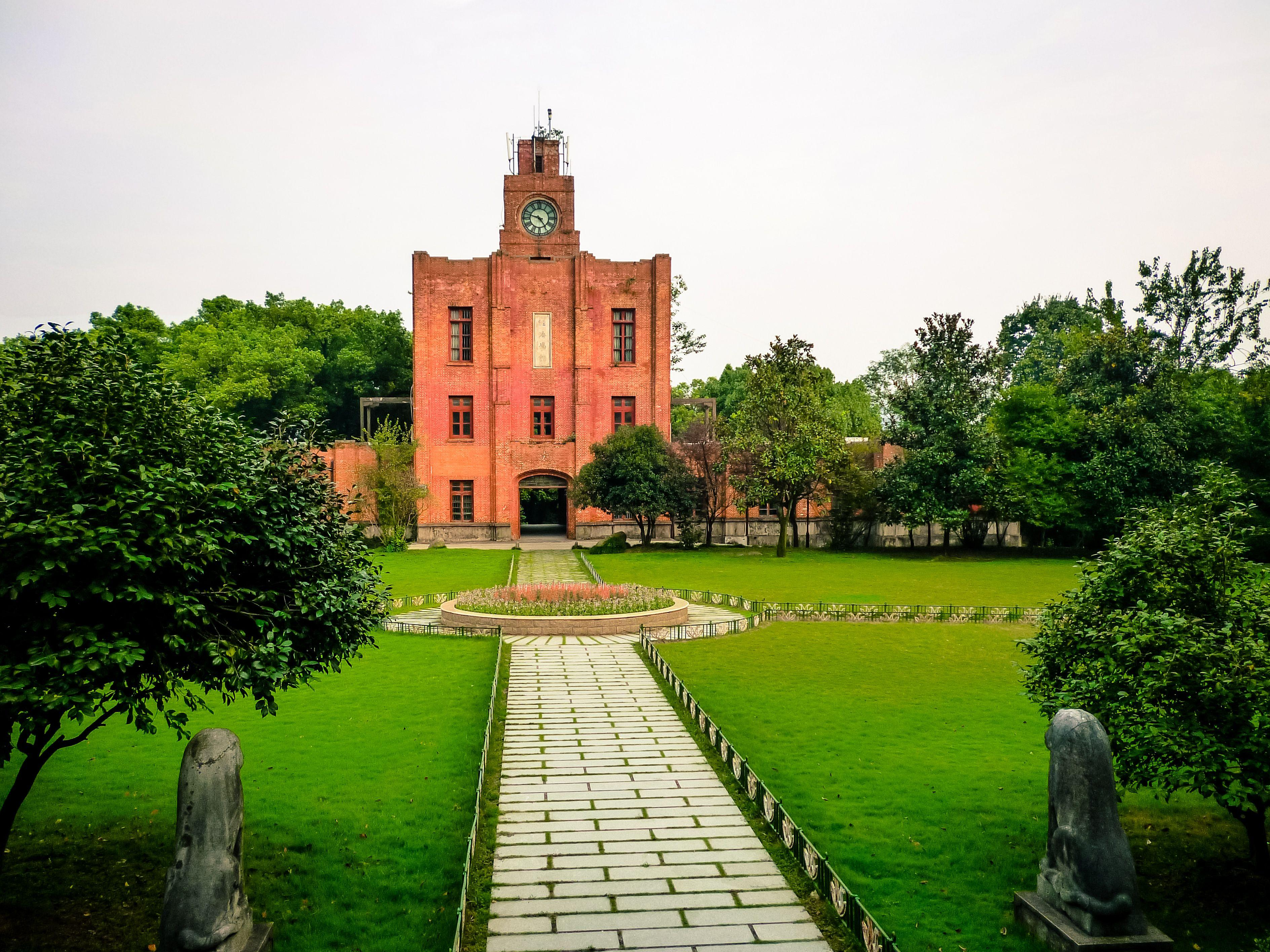 中文（中国大陆）: 之江大学校内一景，图中楼房为之江大学赛佛伦斯堂背面